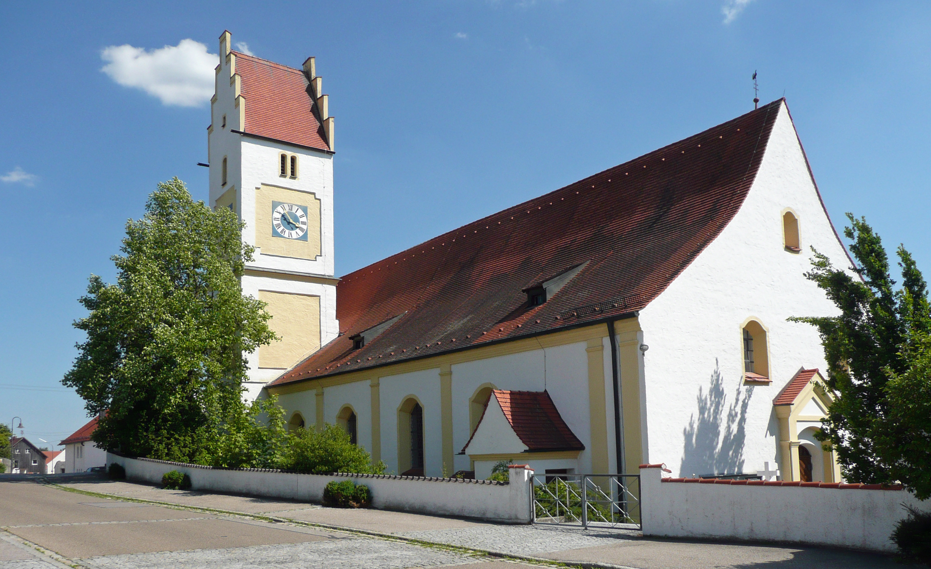 Katholische Pfarrkirche St. Nikolaus in Lenting, Ansicht von Nordwesten. This is a photograph of an architectural monument.